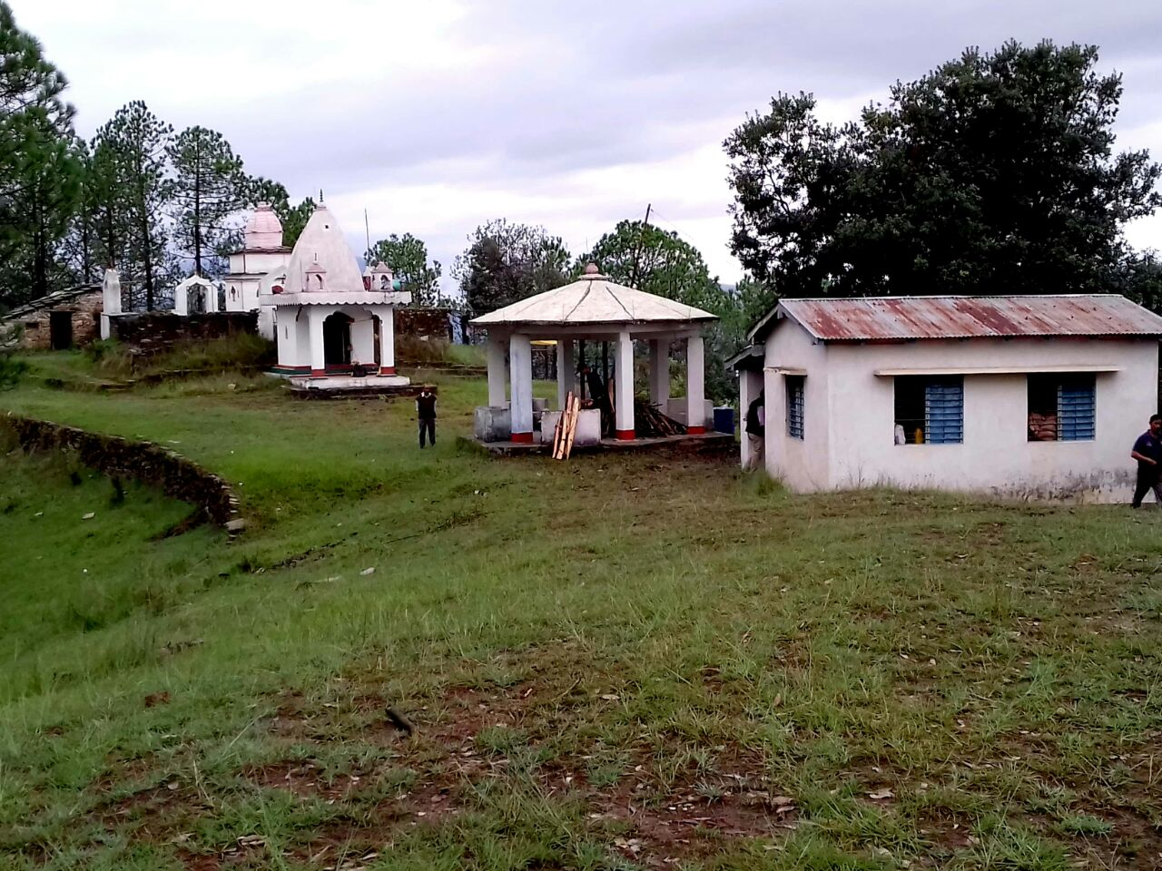 असुरगढ़ी मंदिर